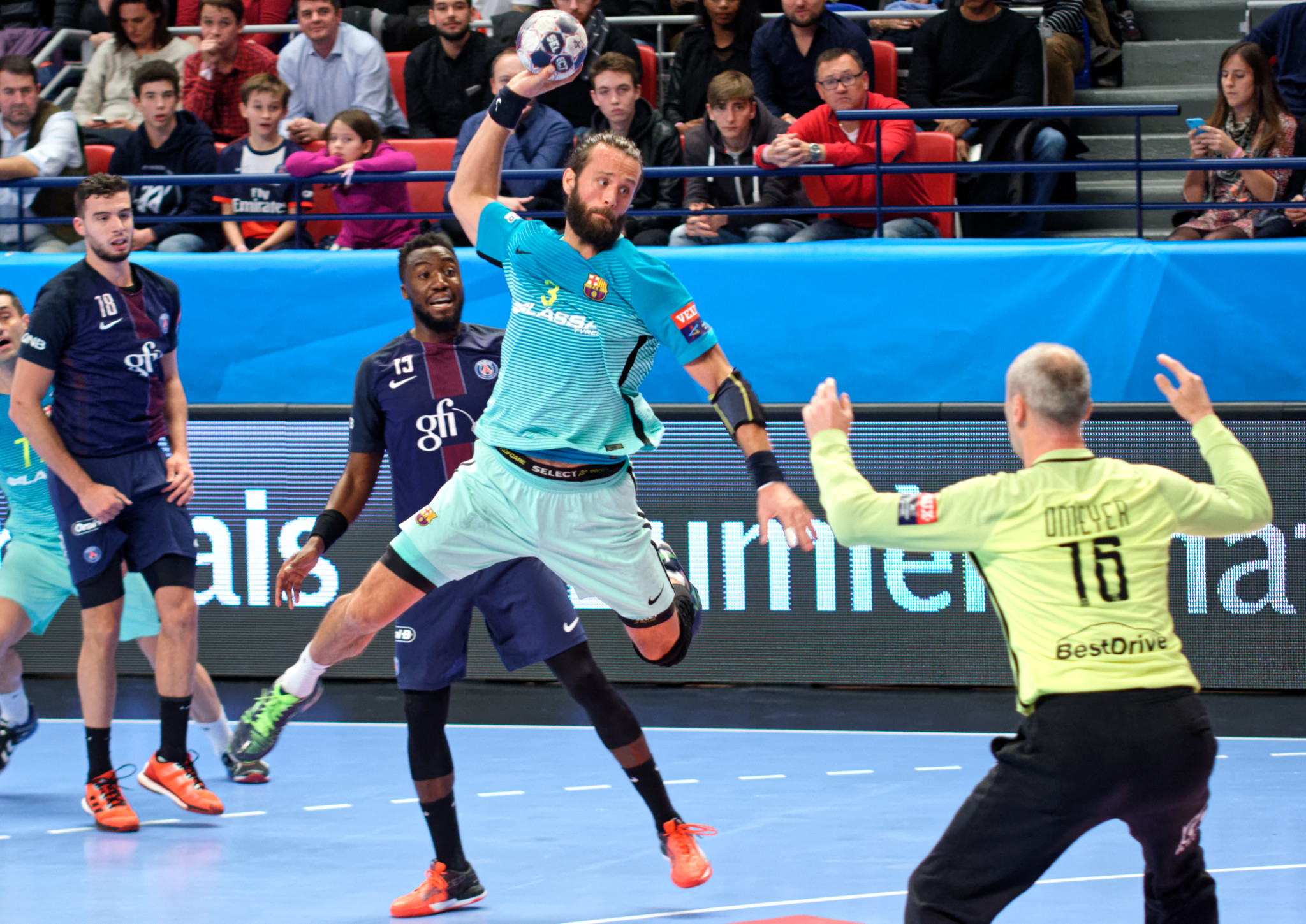 Rencontre de phase de groupe de la ligue des champions 2016-17 entre le PSG et le FC Barcelone. A Coubertin, le 12 novembre 2016.